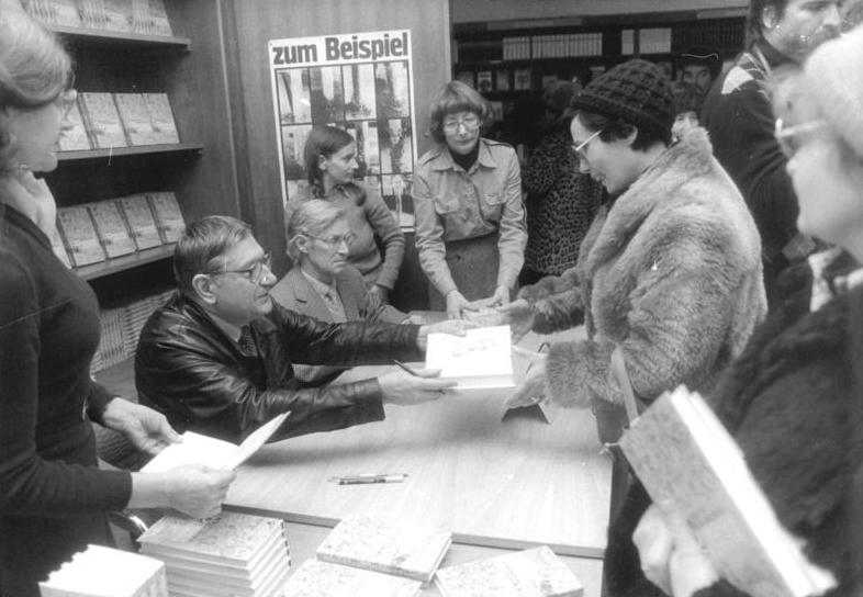 ADN-ZB-Rehfeld-7.1.82-da-Berlin: In der Pankower Heinrich-Mann-Buchhandlung hatte der neuest Feuilletonband Heinz Knoblochs Premiere. Zur Freude der "Bücherwürmer" signierten der Autor (l.) und der Illustrator Paul Rosie (2.v.l.). 250mal stellten sich seit 1972 Autoren in Berliner Buchhandlungen mit ihren neuesten Werken vor oder signierten Bekanntes für ihre Leser."